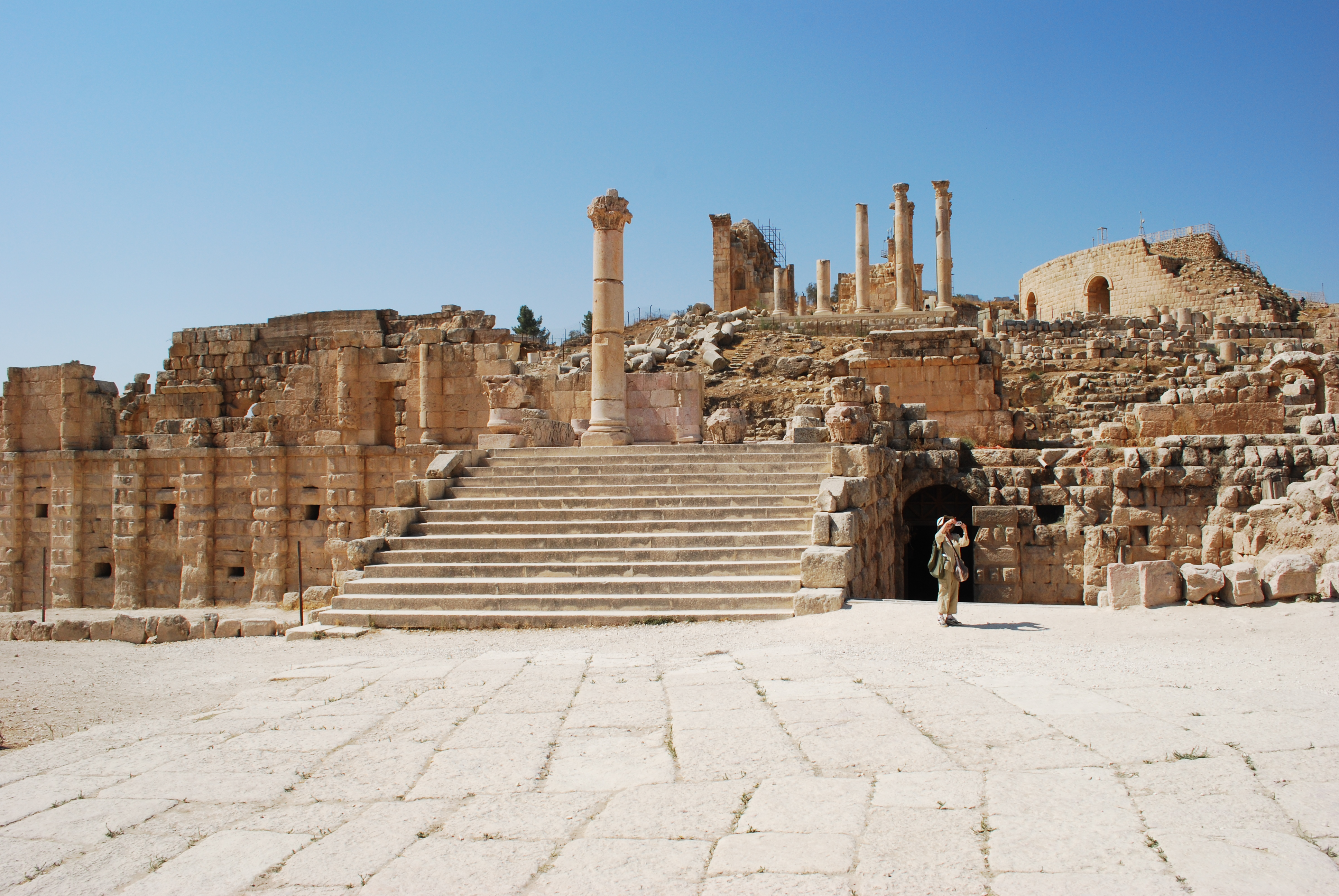 Temenos du temple de Zeus.